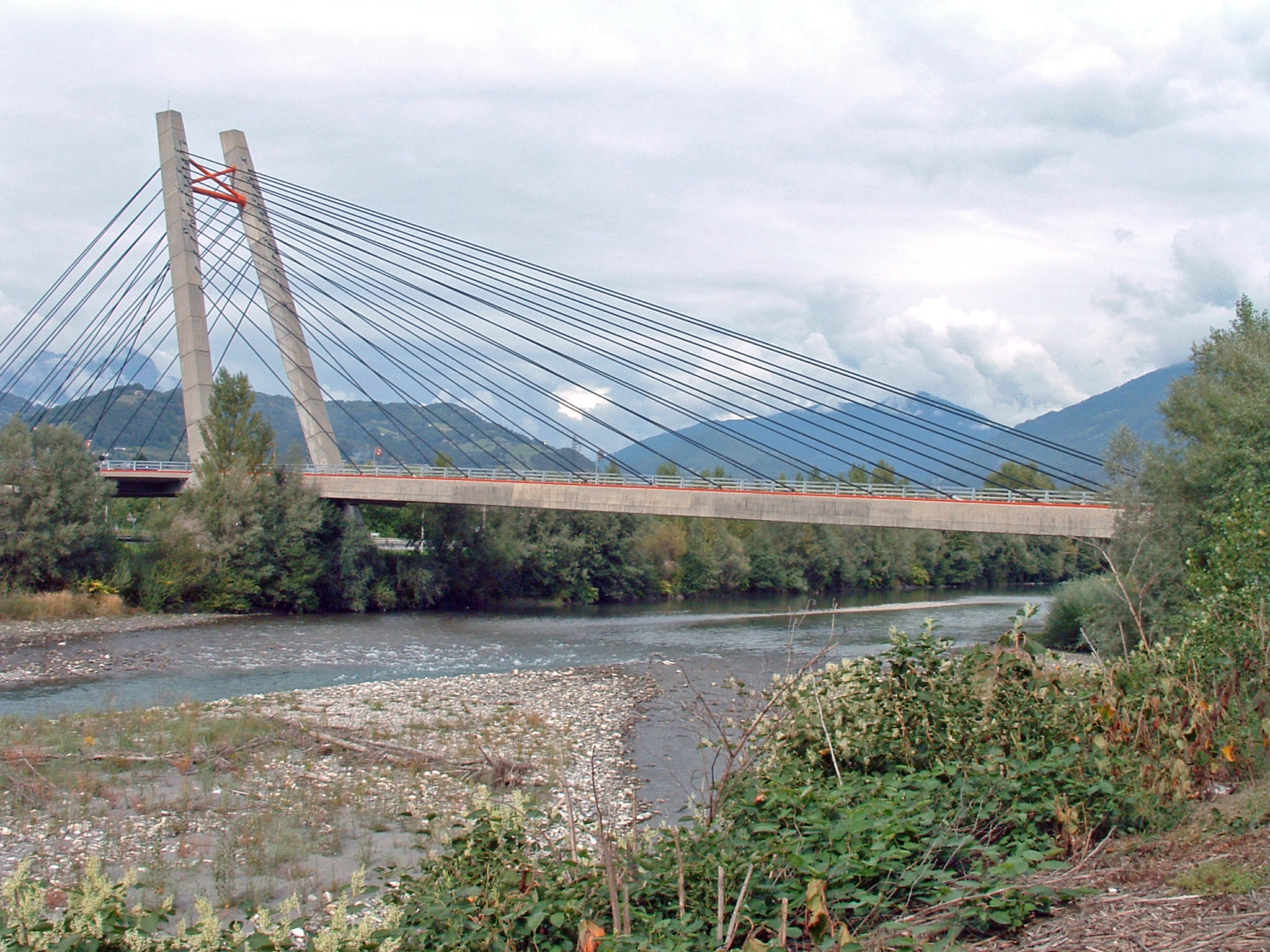 Gilly-sur-Isère - Pont de Gilly sur l'Isère - Pont à haubans